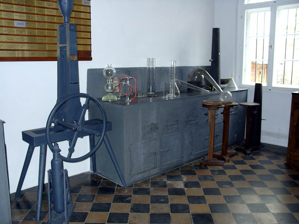 CO2-Verfüssiger in Liebigs Privatlabor